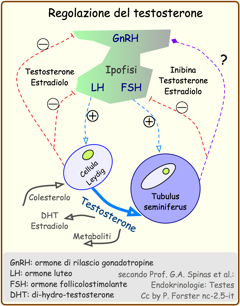 Regolazione intrinsica del testosterone: GnRH, LH, FSH,Estradiolo, Inibina, DHT, Colesterolo, Cellula Leydig, Tubulus seminiferus, Ipofisi